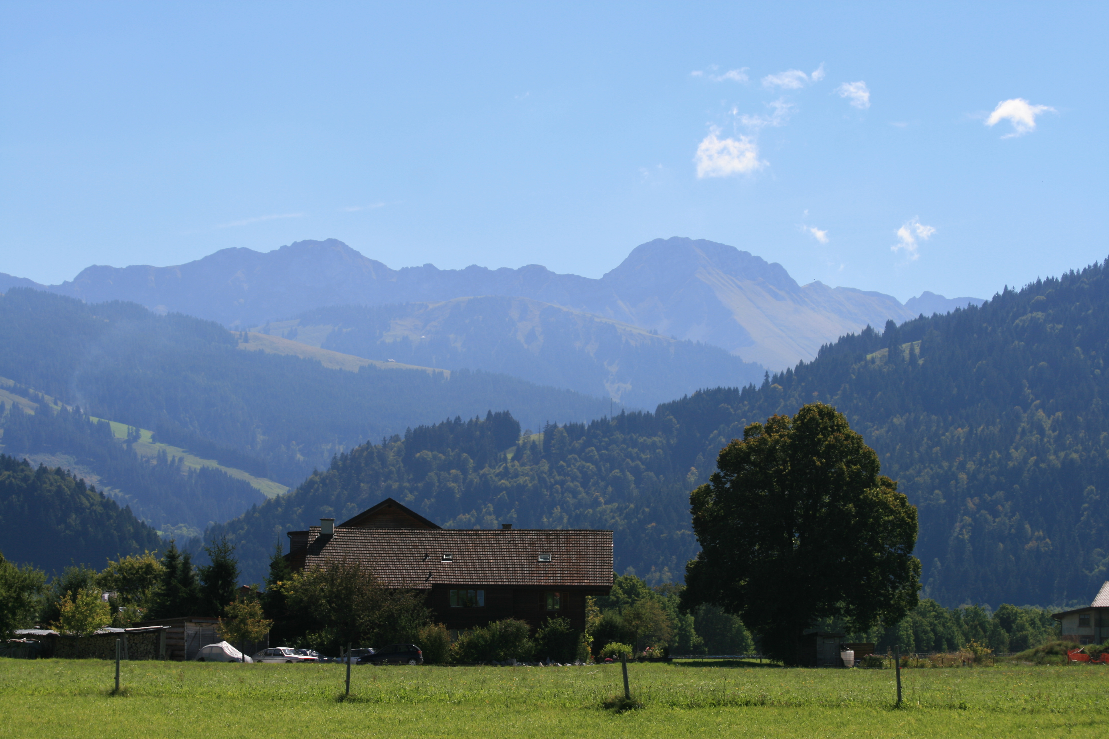 Haus in Plaffeien und Blick ins Sensetal Richtung Schwarzsee, Kanton Freiburg, Schweiz